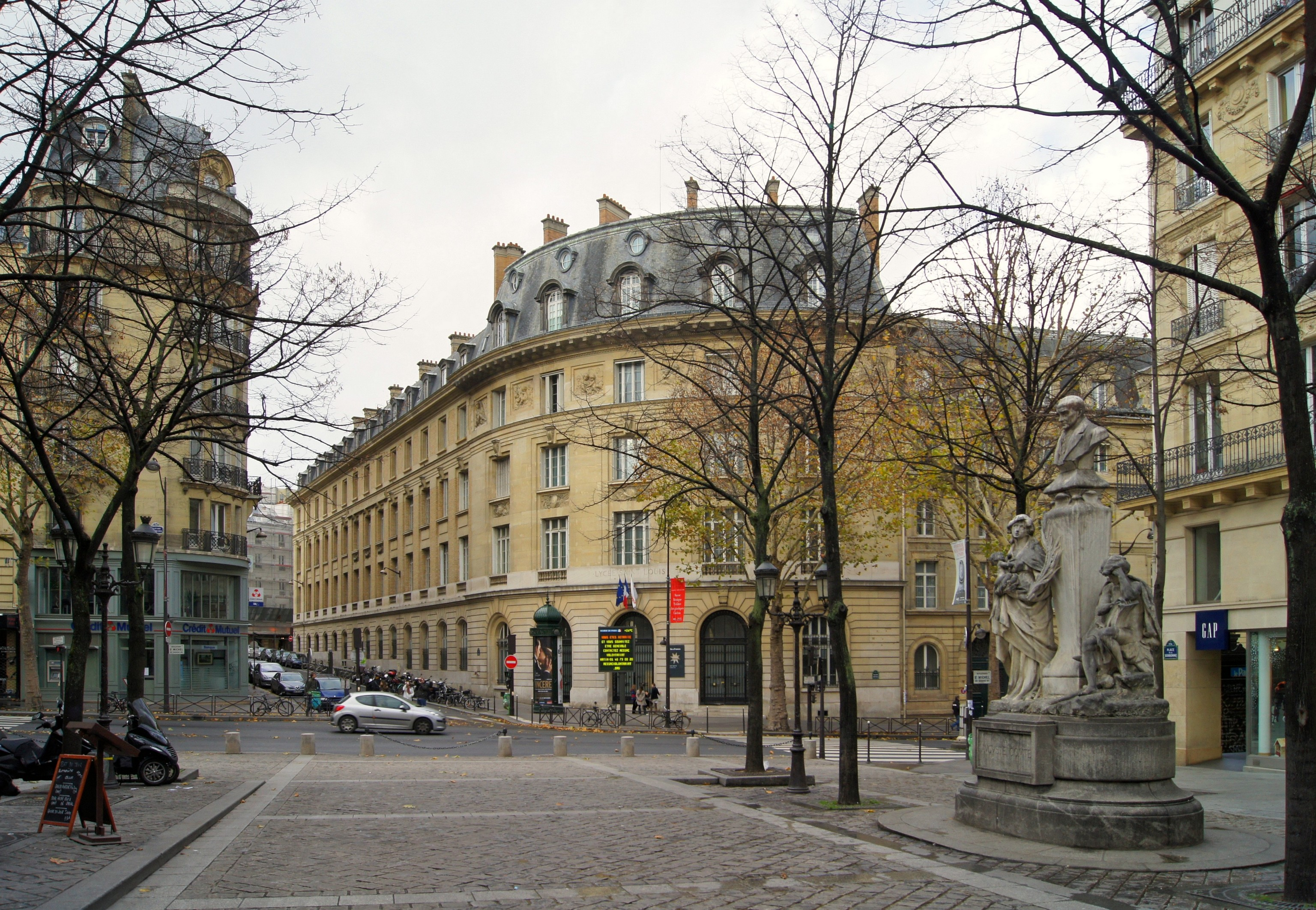 Lycée Saint-Louis à Paris